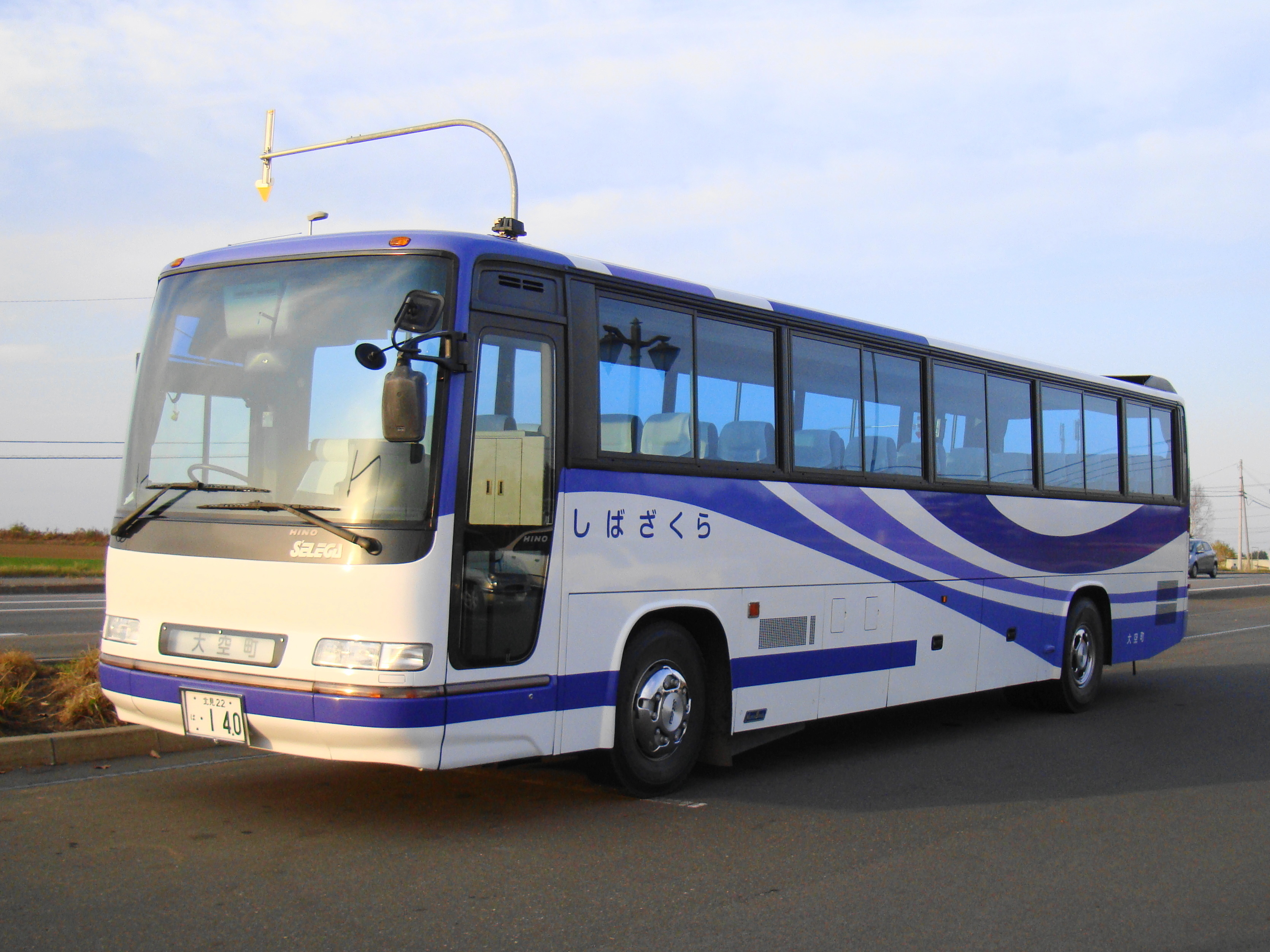 Memanbetsu to Higashi-Mokoto